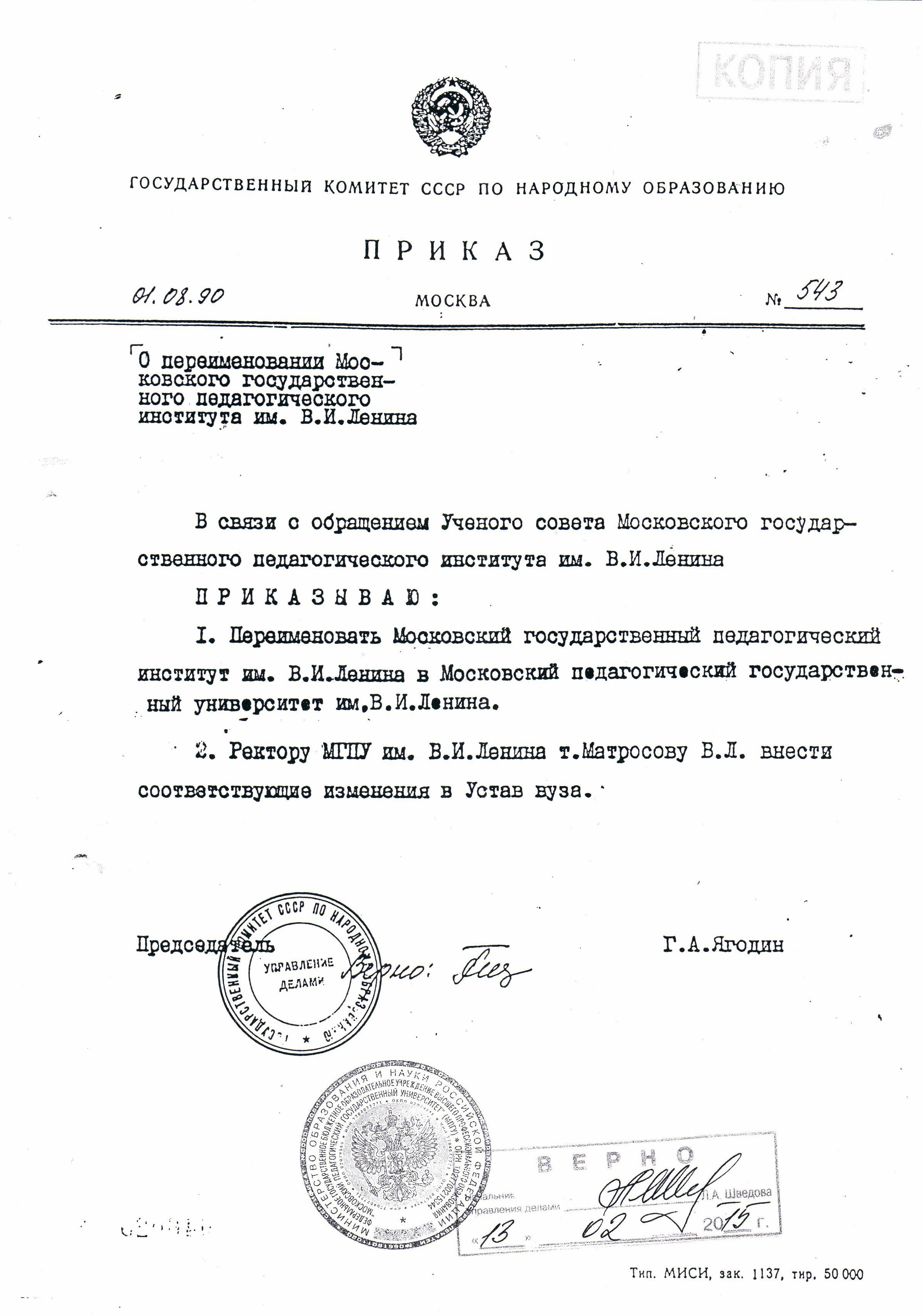 Копия приказа о переименовании МГПИ им В. И. Ленина в МПГУ им В. И. Ленина, от 01.08.1990 г.